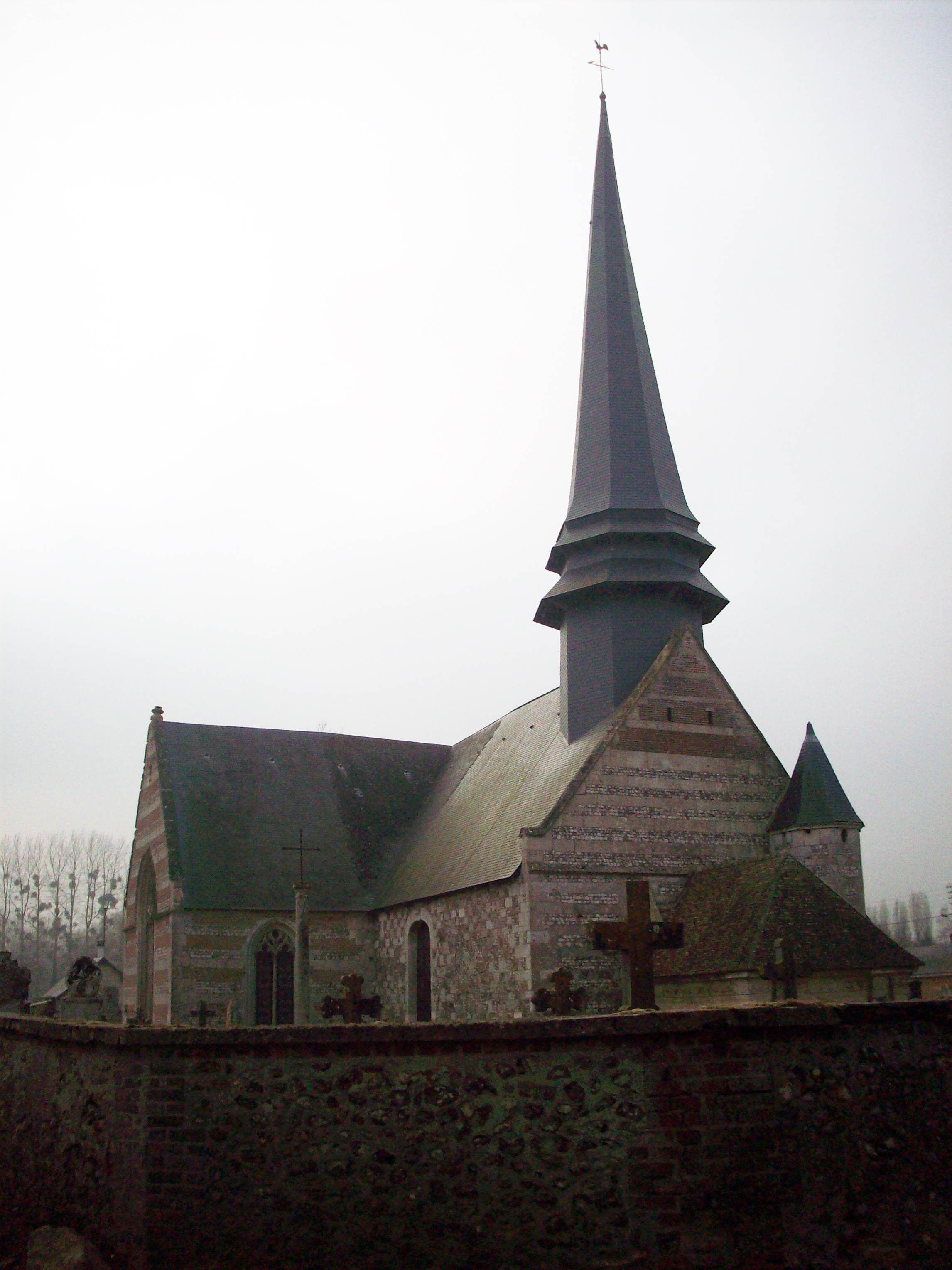 Eglise Saint-Sigismond de Nojeon-en-Vexin.